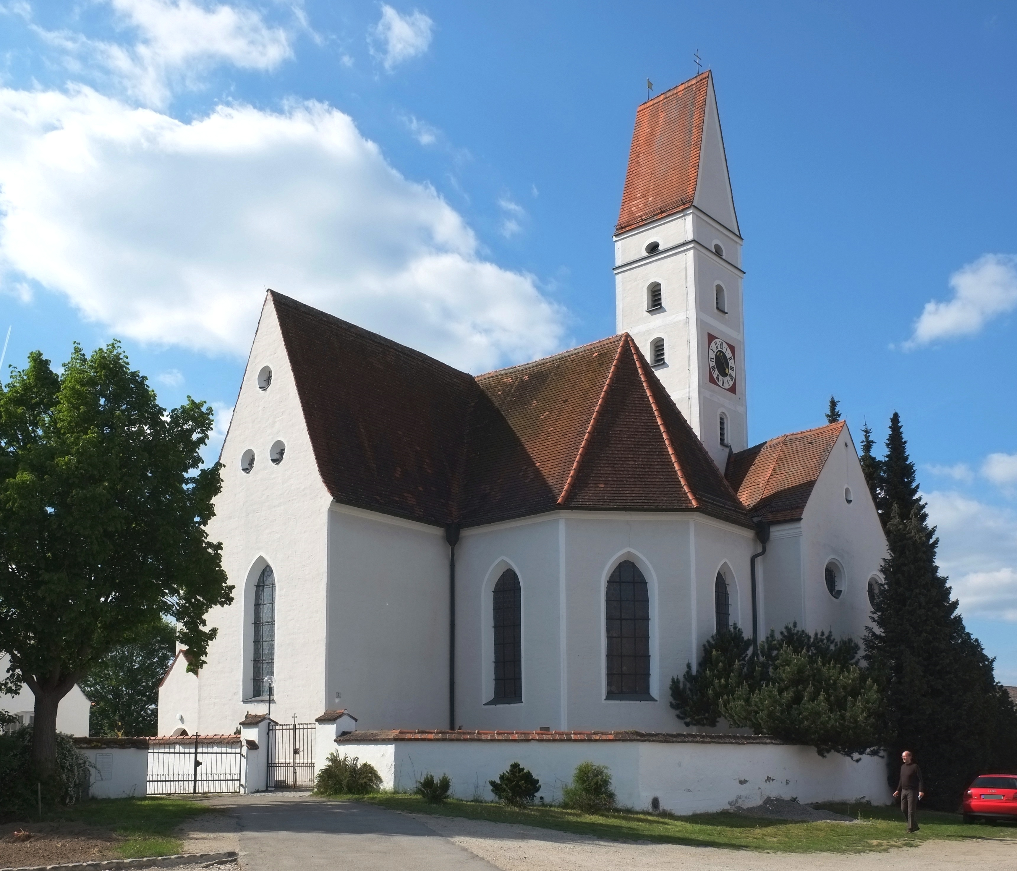 Katholische Kirche St. Laurentius und Stephanus in Kühbach im Landkreis Aichach-Friedberg (Bayern, Deutschland)